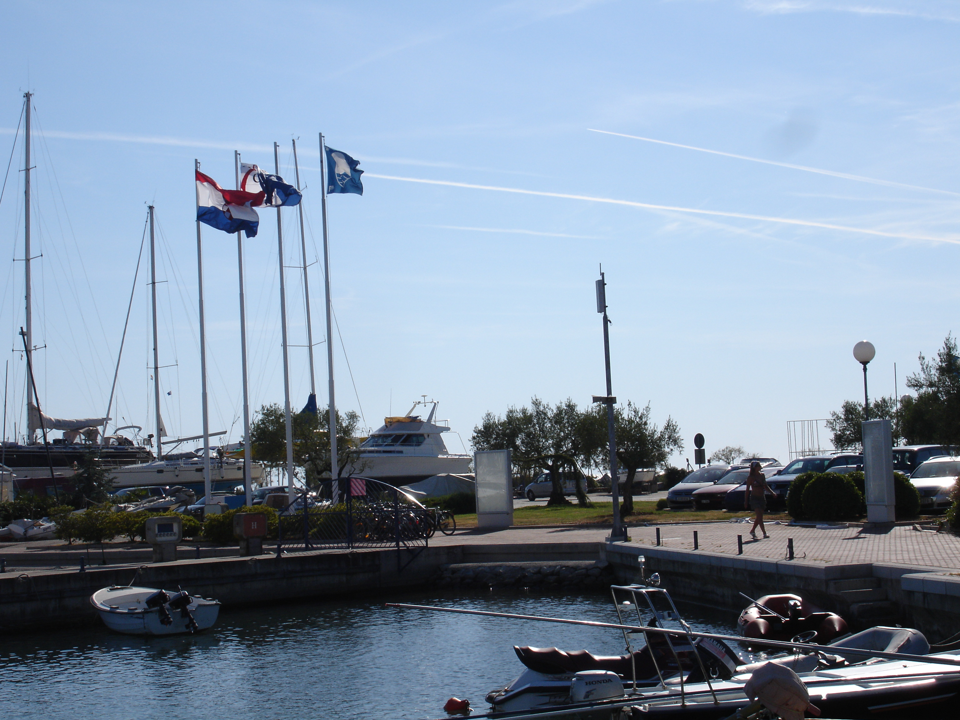 Umag La marina de Umag en croatie